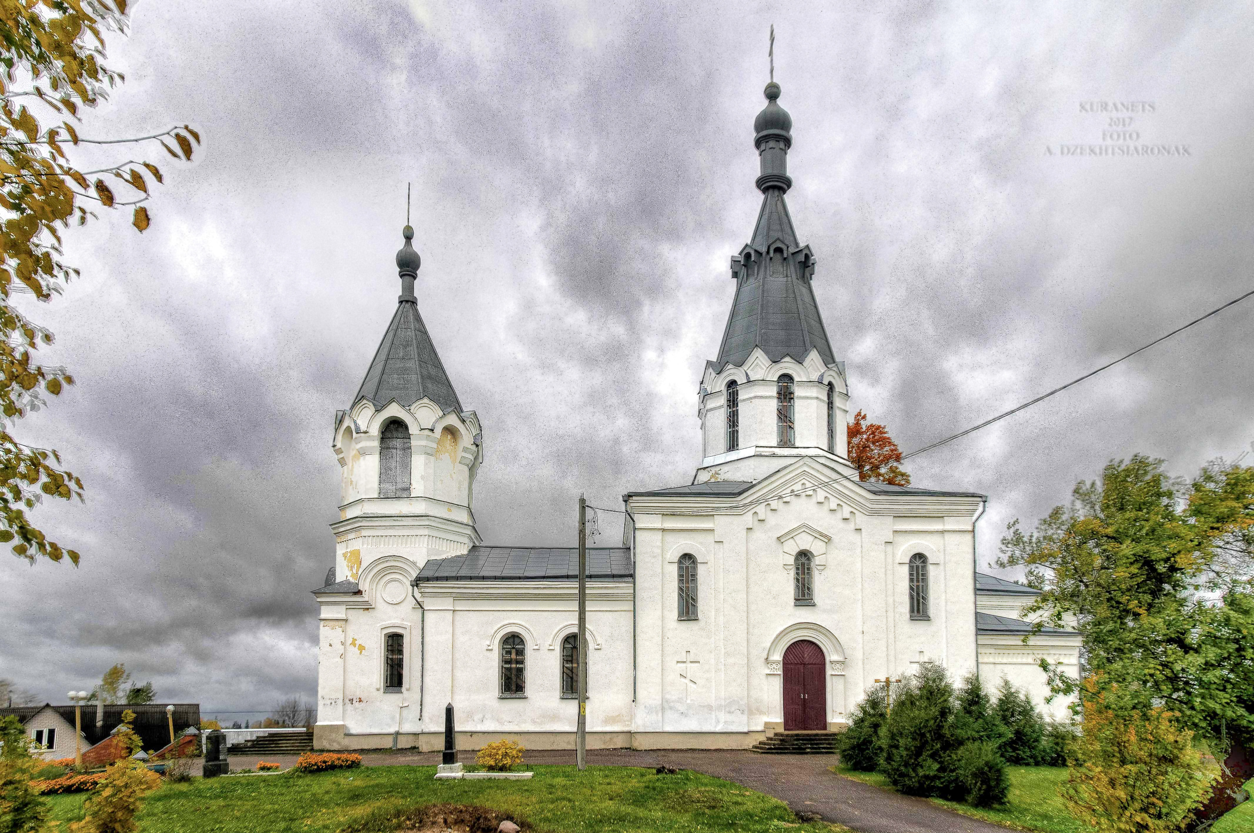 Куранец. Царква ў 2017 годзе